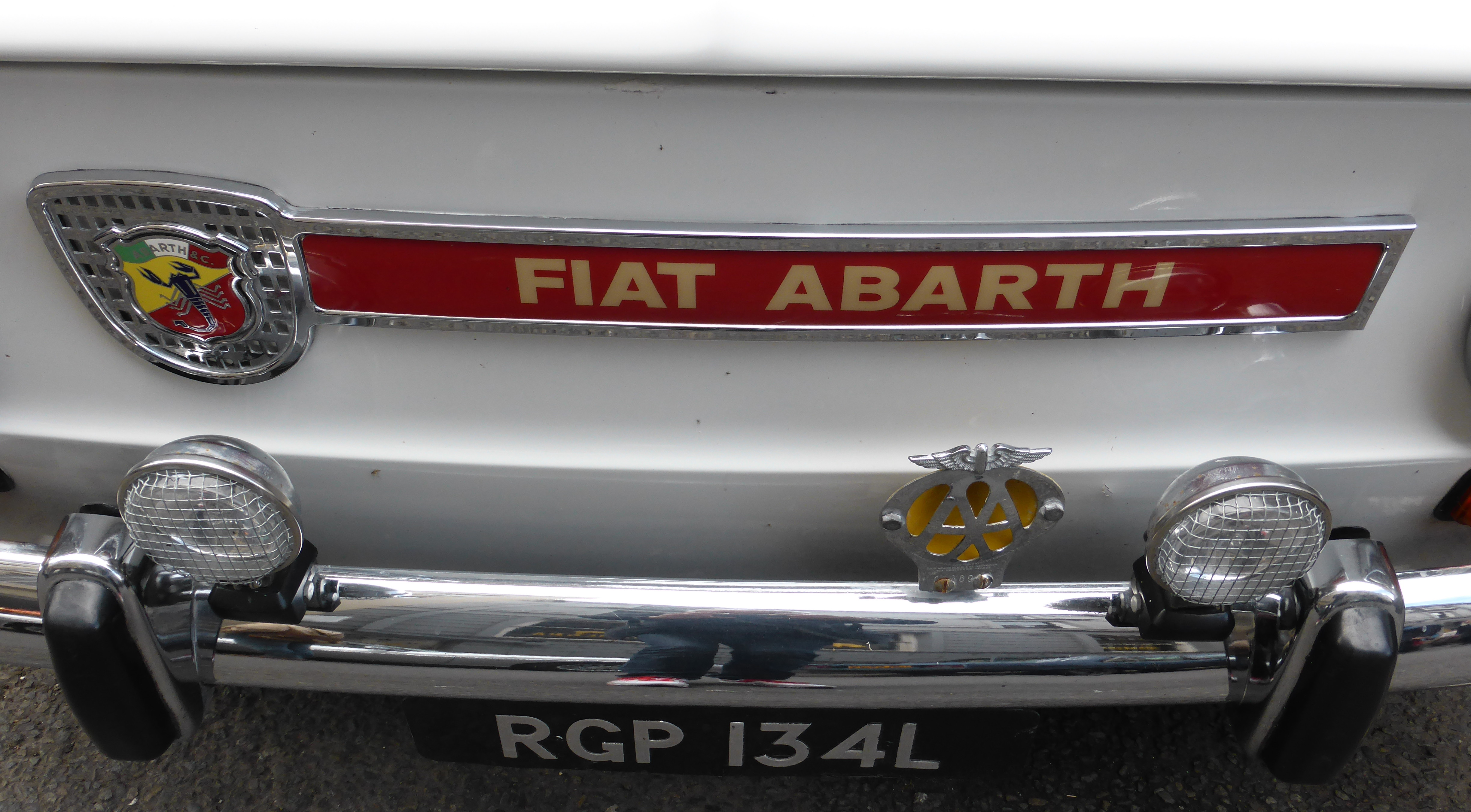 Bristol Italian AutoMoto Festival